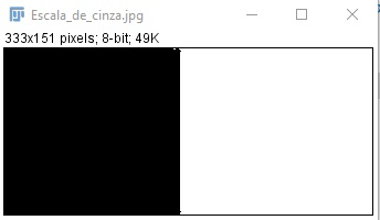 Imagens de tons de cinza após a utilização do método Thresholding